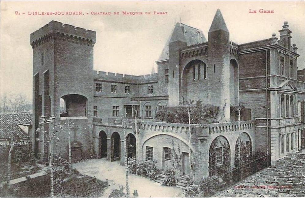 Carte postale du Château de Panat (l'Isle Jourdain) fin du XIXe